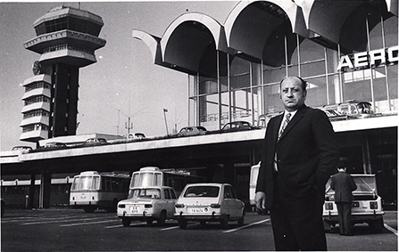 Aéroport international de Bucarest Otopeni